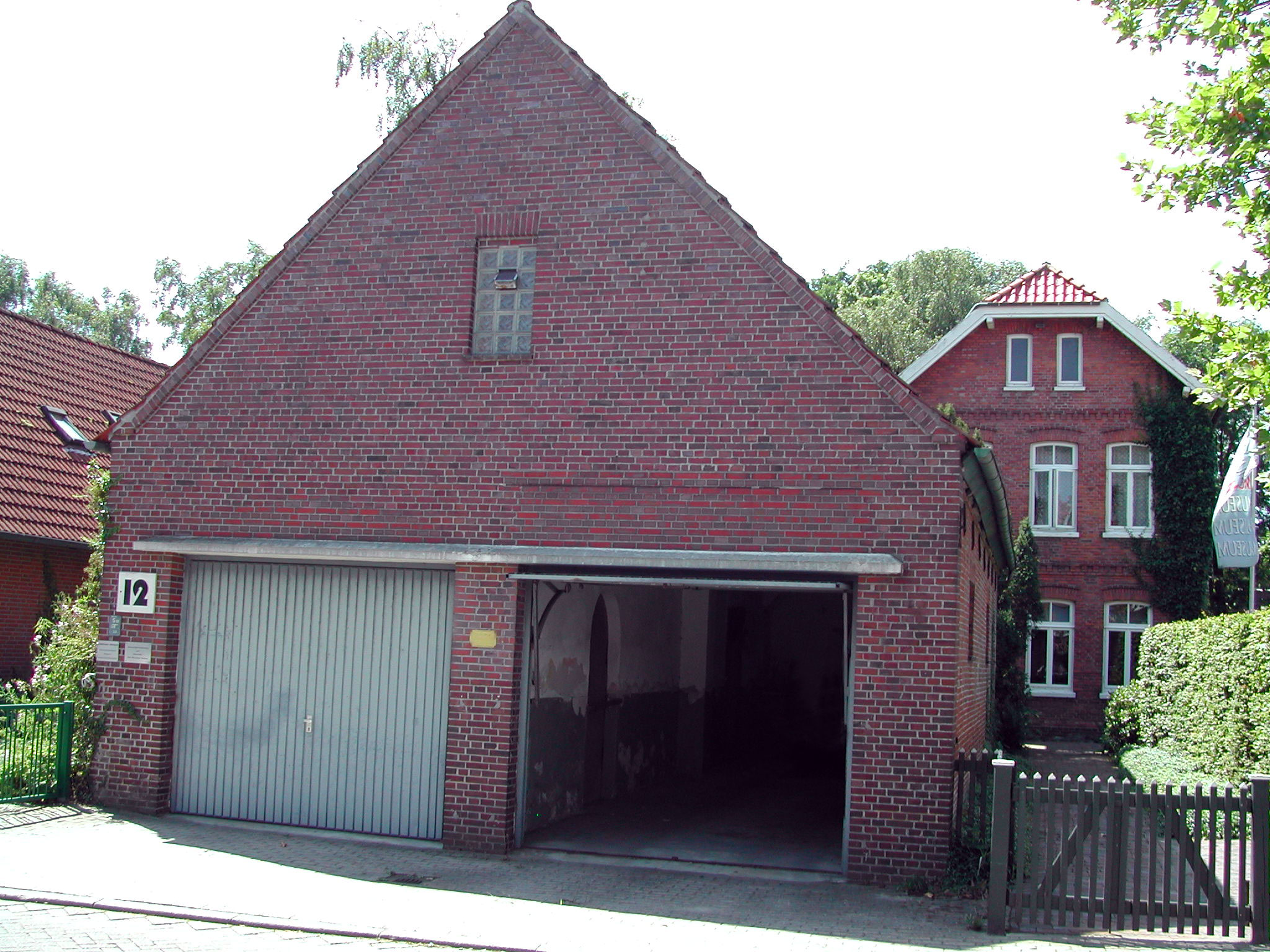 former synagogue in Esens